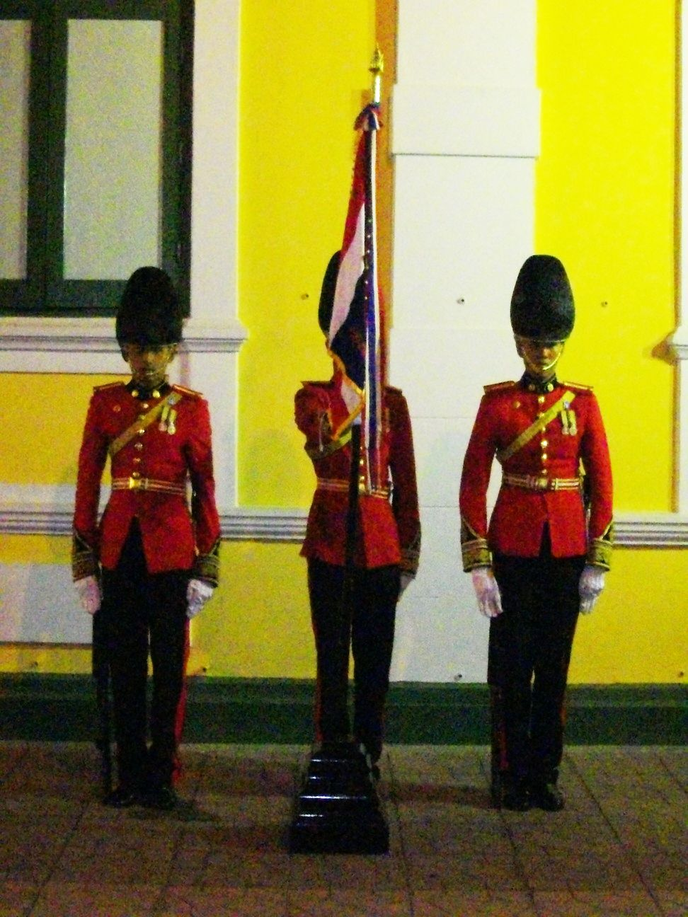 หมู่เชิญธงชัยเฉลิมพลของกรมนักเรียนนายร้อยรักษาพระองค์ โรงเรียนนายร้อยพระจุลจอมเกล้า ก่อนเข้าริ้วกระบวนเชิญพระศพสมเด็จพระเจ้าพี่นางเธอ เจ้าฟ้ากัลยานิวัฒนา กรมหลวงนราธิวาสราชนครินทร์ วันที่ 15 พฤศจิกายน พ.ศ. 2551 (ถ่ายขณะตั้งแถวทหารที่ถนนกัลยาณไมตรี)